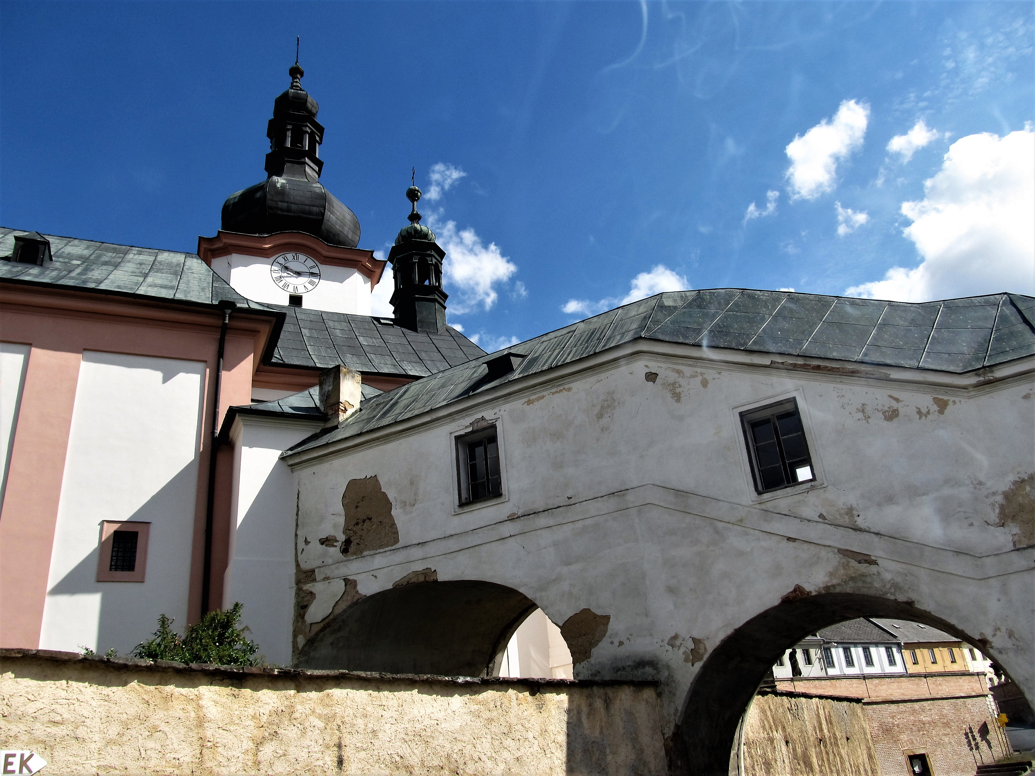 Krytá chodba ze zámku do kostela